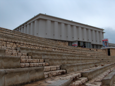 בניין מוזיאון לוחמי הגיטאות בקבוץ he:לוחמי הגיטאות ובחזיתו התיאטרון בו מתקיים טקס פתיחת אירועי יום השואה מידי שנה בישראל. הקומפלקס תוכנן בסוף שנות ה-40 על ידי האדריכל משה ביקלס, וכיום עובר שיפוצים והרחבות על ידי האדריכל he:צבי אפרת.